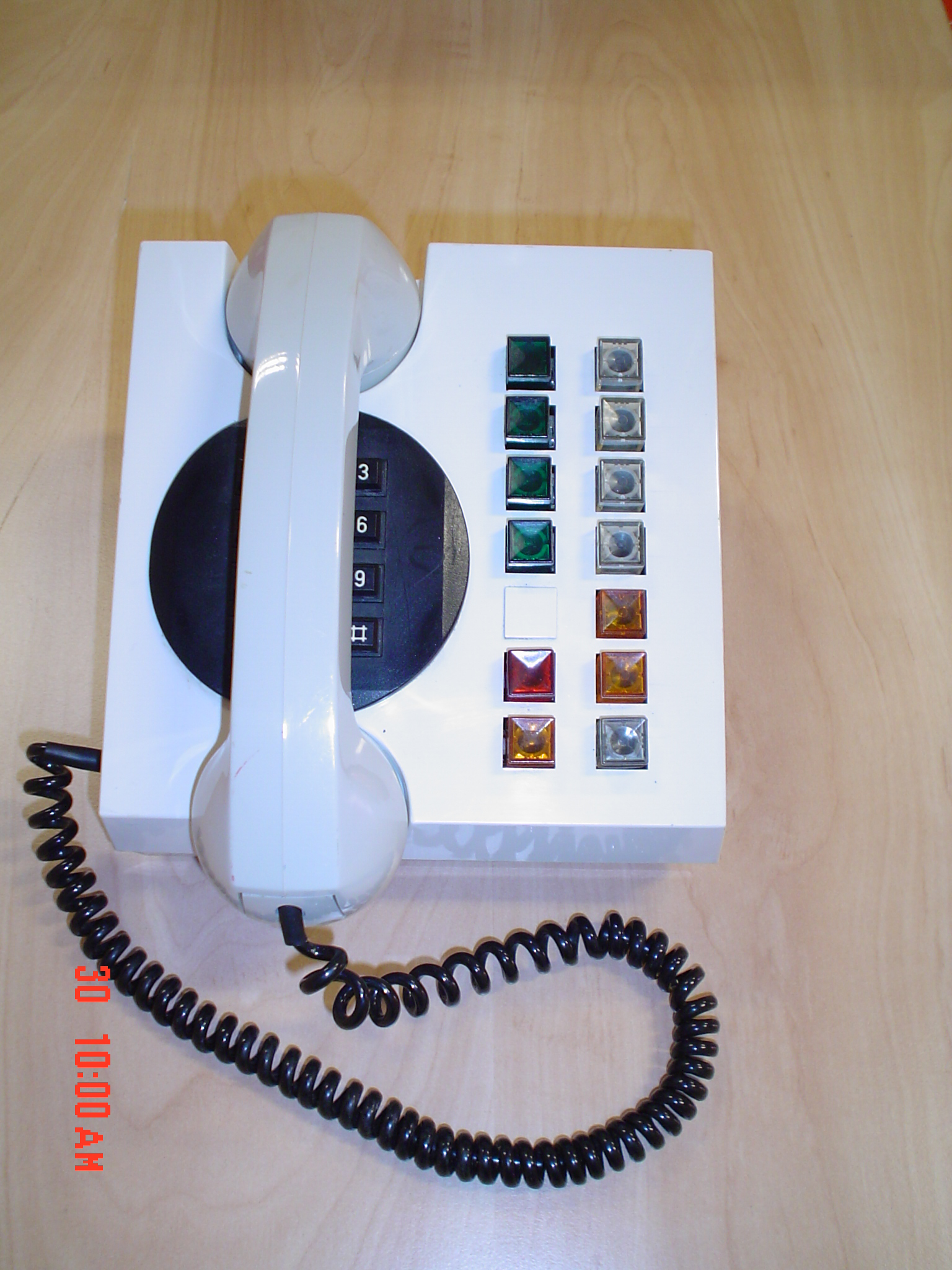 CB 555 soros-párhuzamos telefon (Telefonmúzeum, Miskolc)